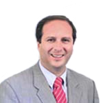 Zarko Luksic Sandoval, político chileno.